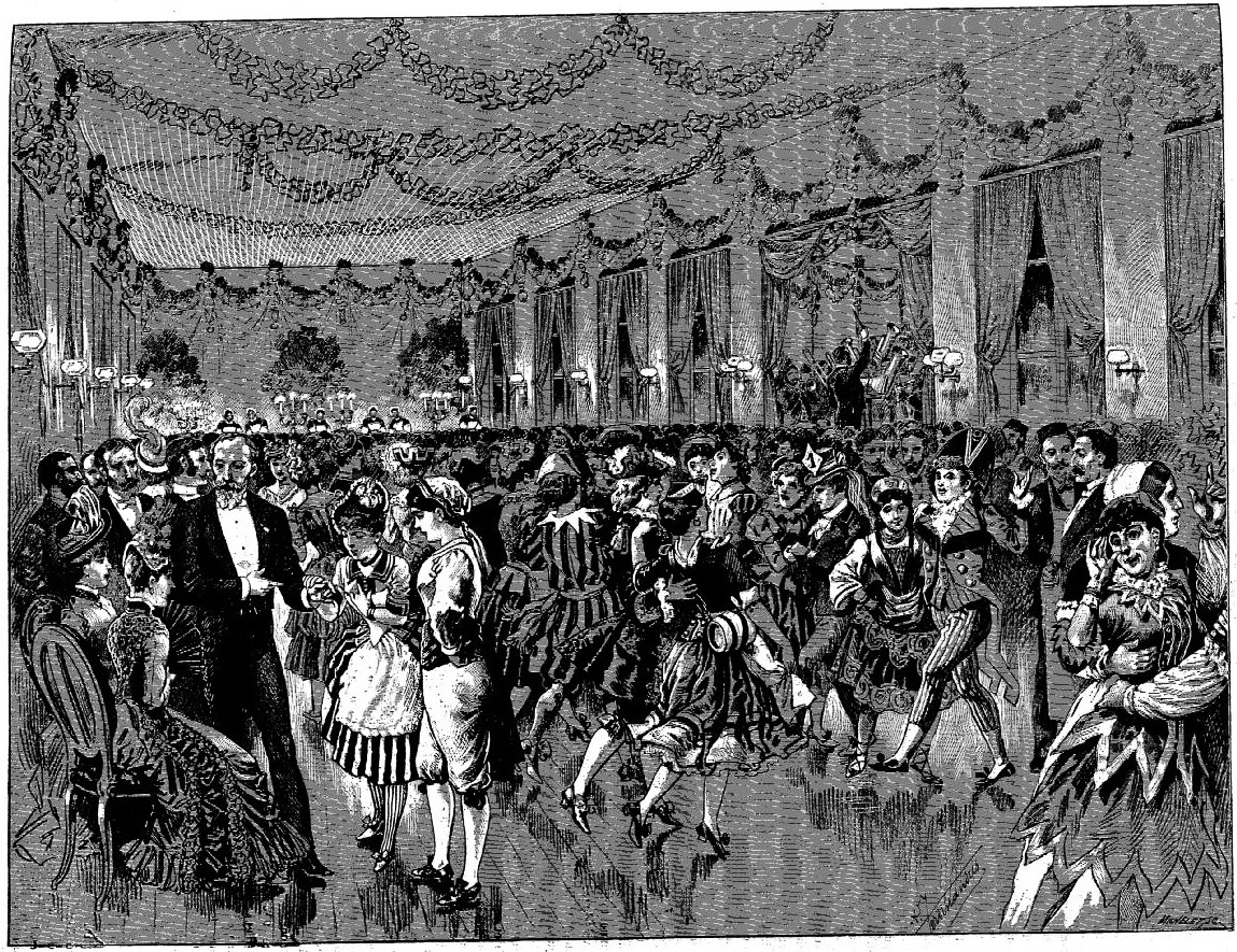 Bal des folles à la Salpetrière.